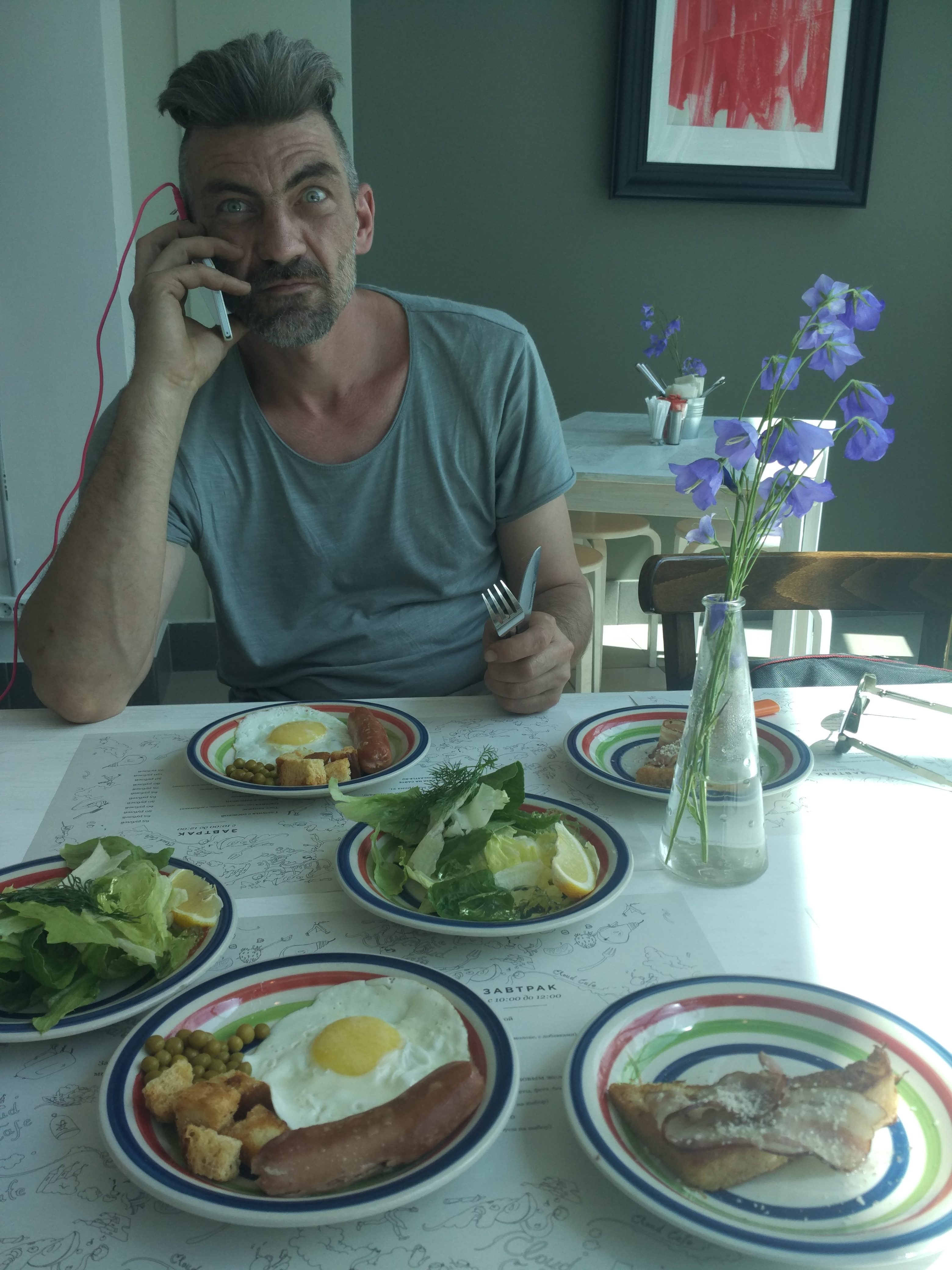 Фрол Веселый 2017